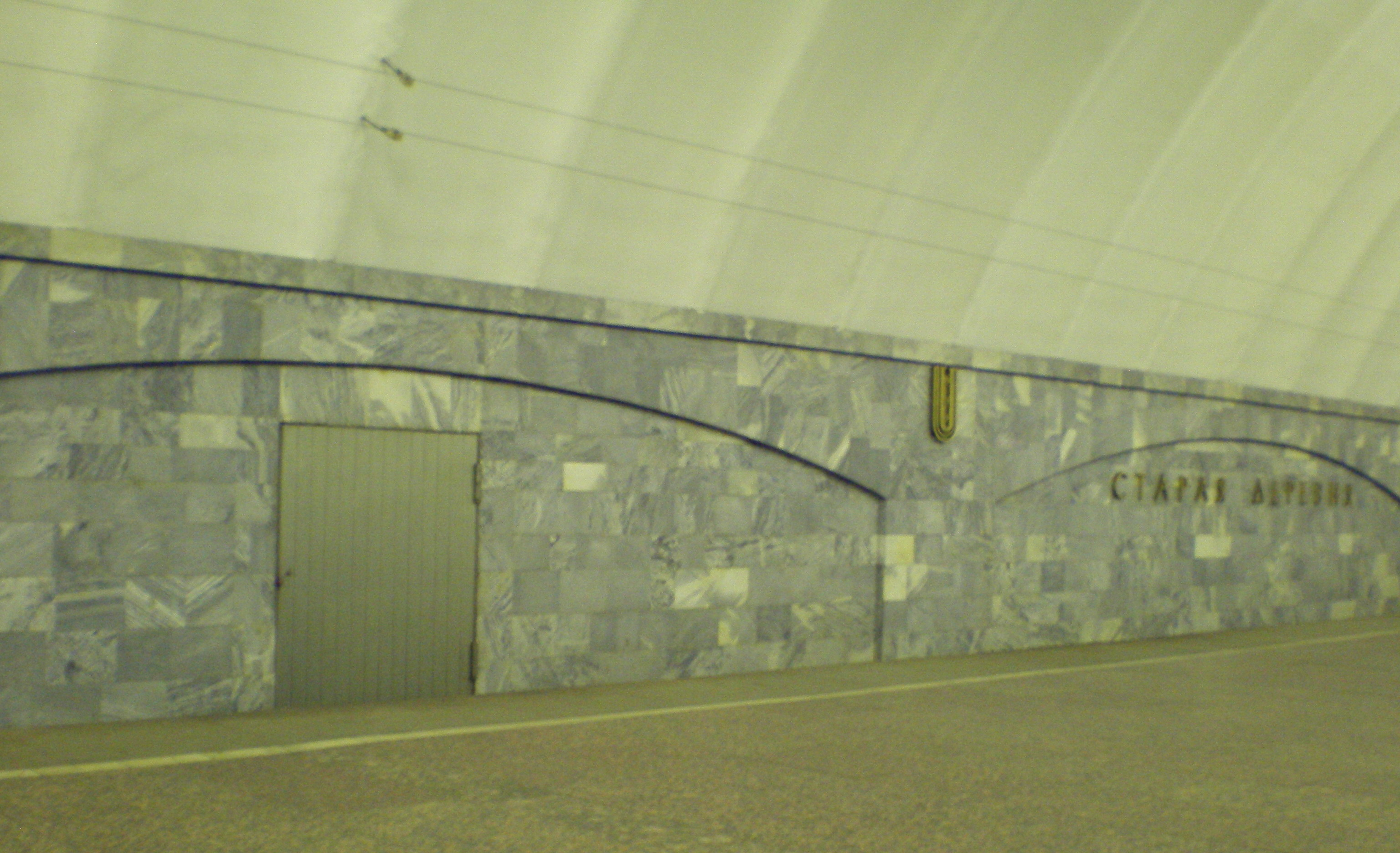 Путевая стена станции метро «Старая деревня»